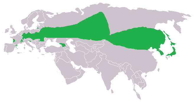 Rozmieszczenie modraszka telejusa (opracowanie własne)